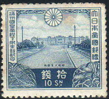 満州国皇帝であった溥儀の訪日記念として発行された赤坂離宮を描く10銭切手。